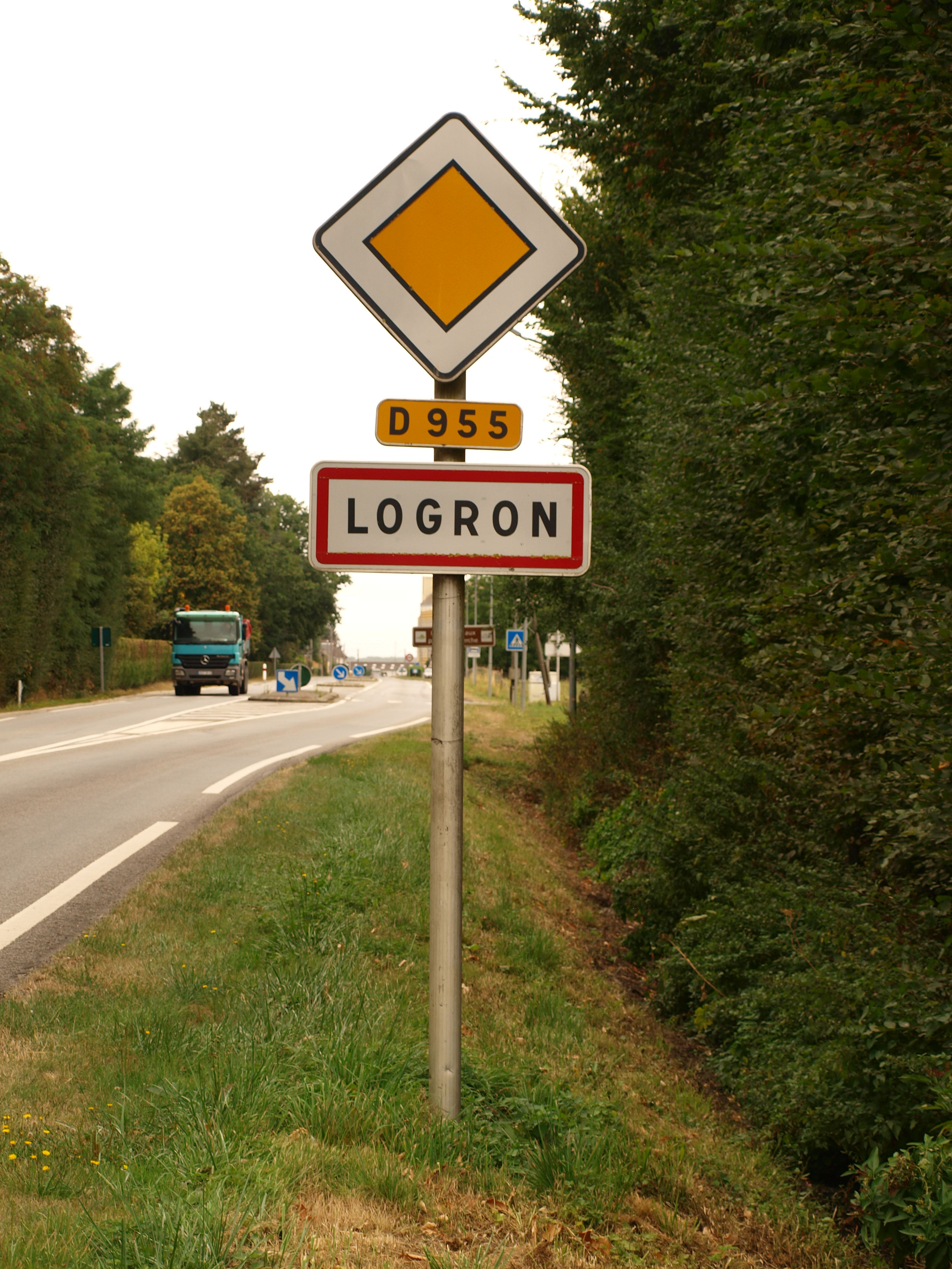 Logron (Eure-et-Loir , France) ; panneau d'agglomération en arrivant de Châteaudun.